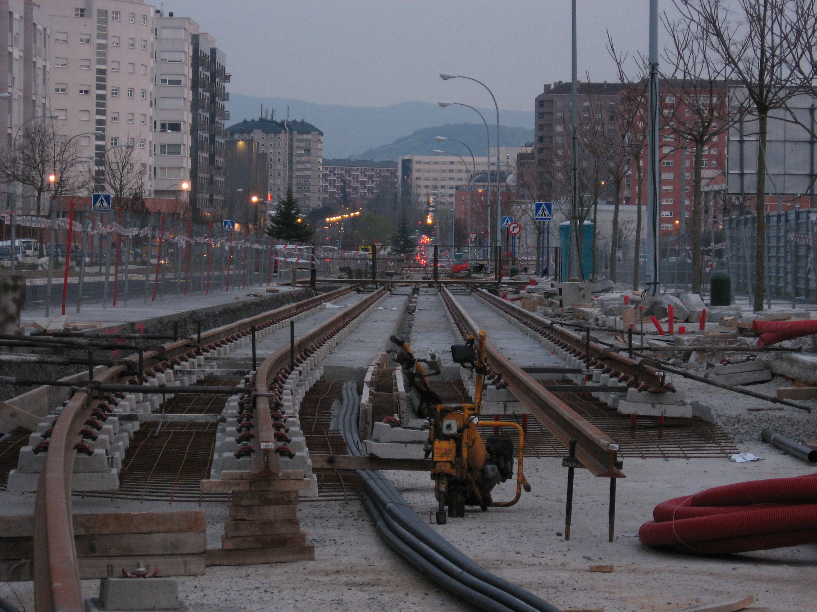 Desc: Obras para la instalación del Tranvía en Vitoria-Gasteiz. Calle duque de Wellingtong en el barrio de Lakua.